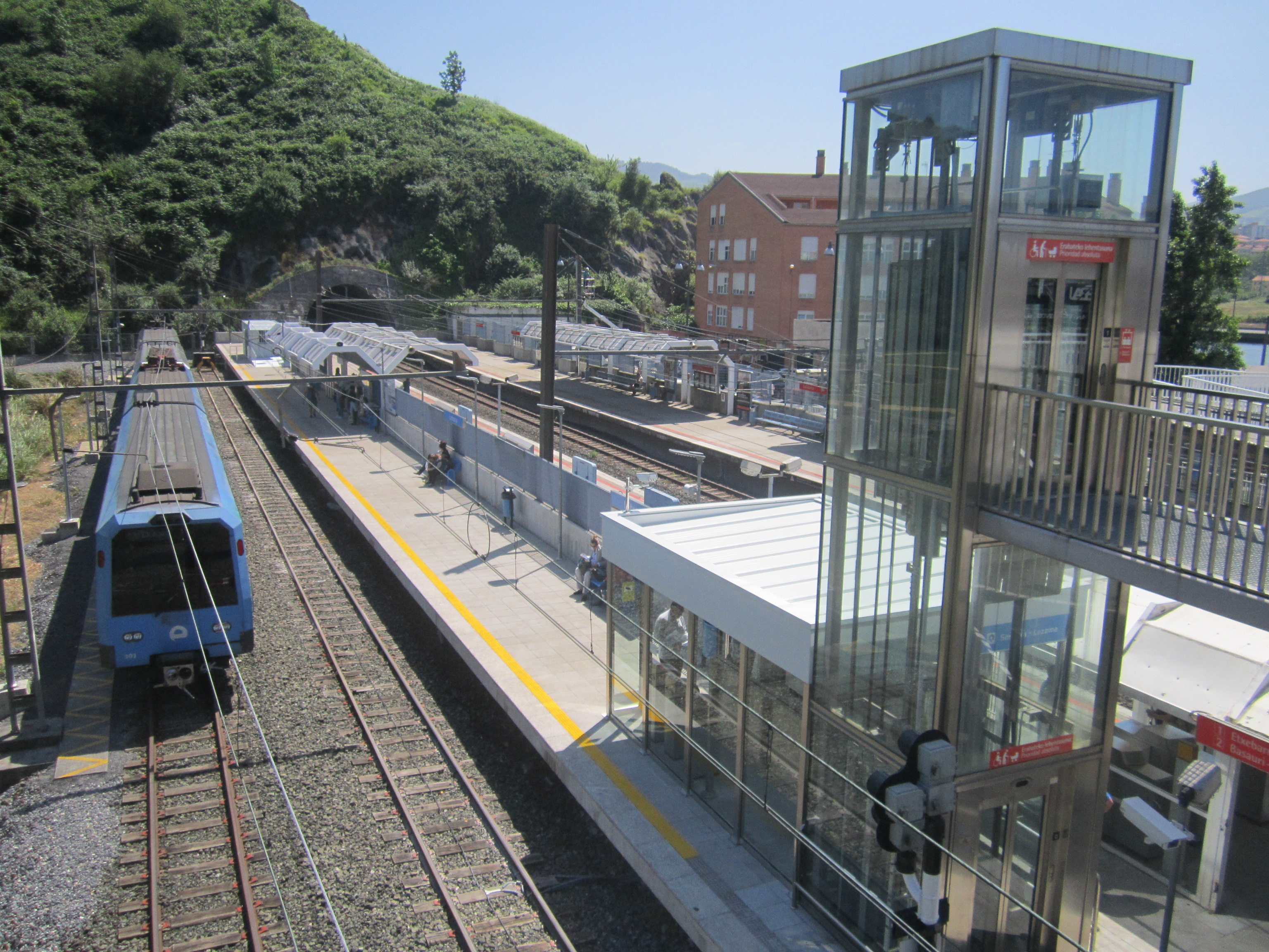 Unidad de Euskotren en la estación de Lutxana (Erandio)